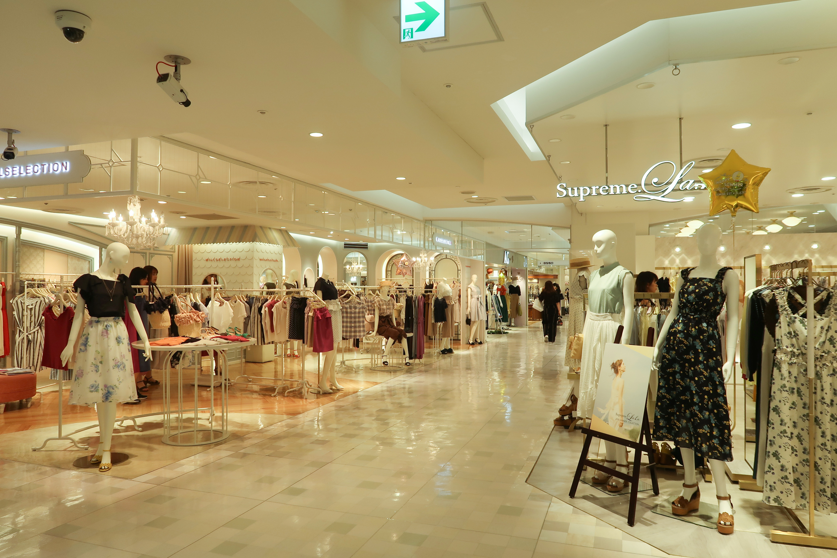 Lumine EST Level 4